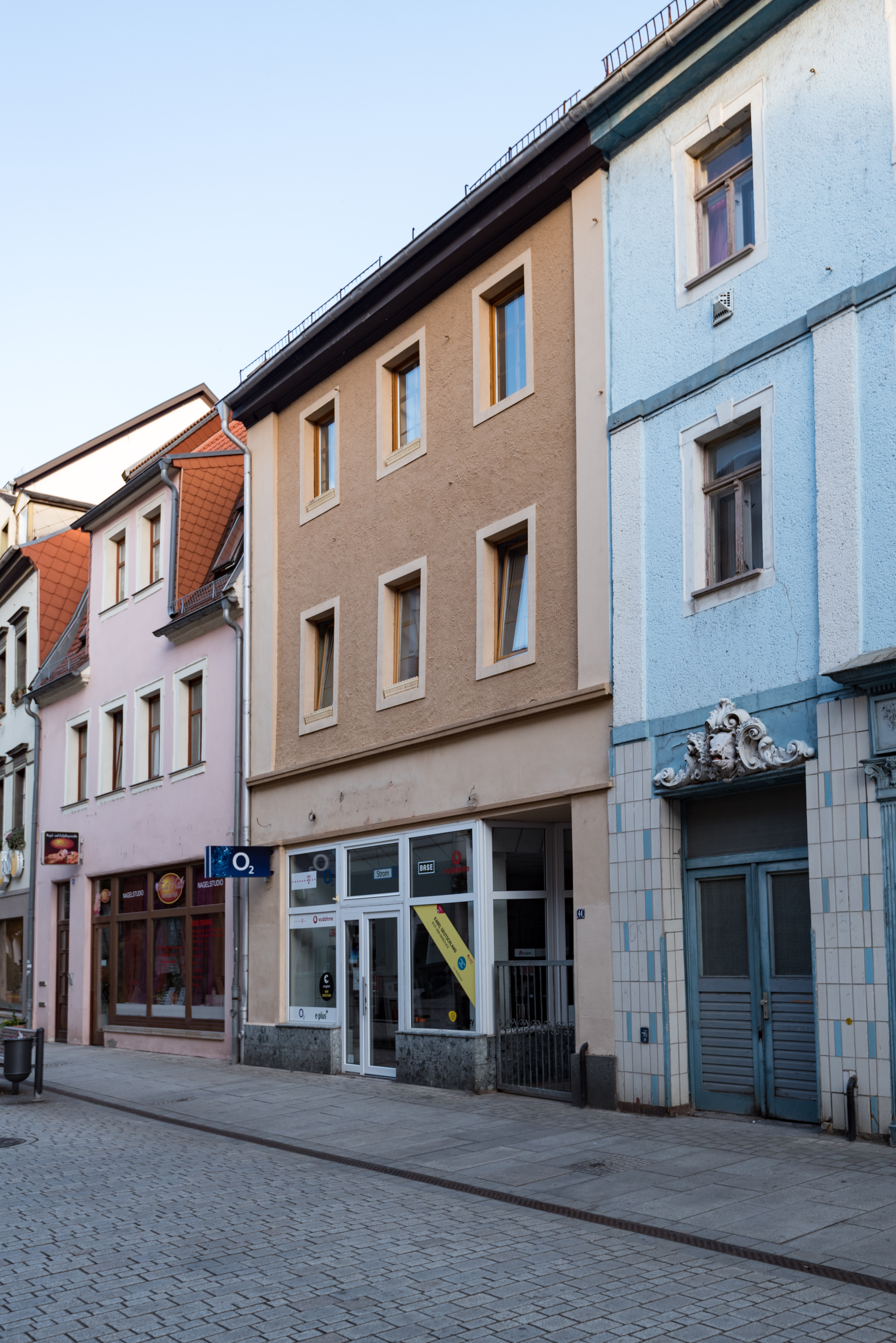 Weißenfels, Jüdenstraße 44